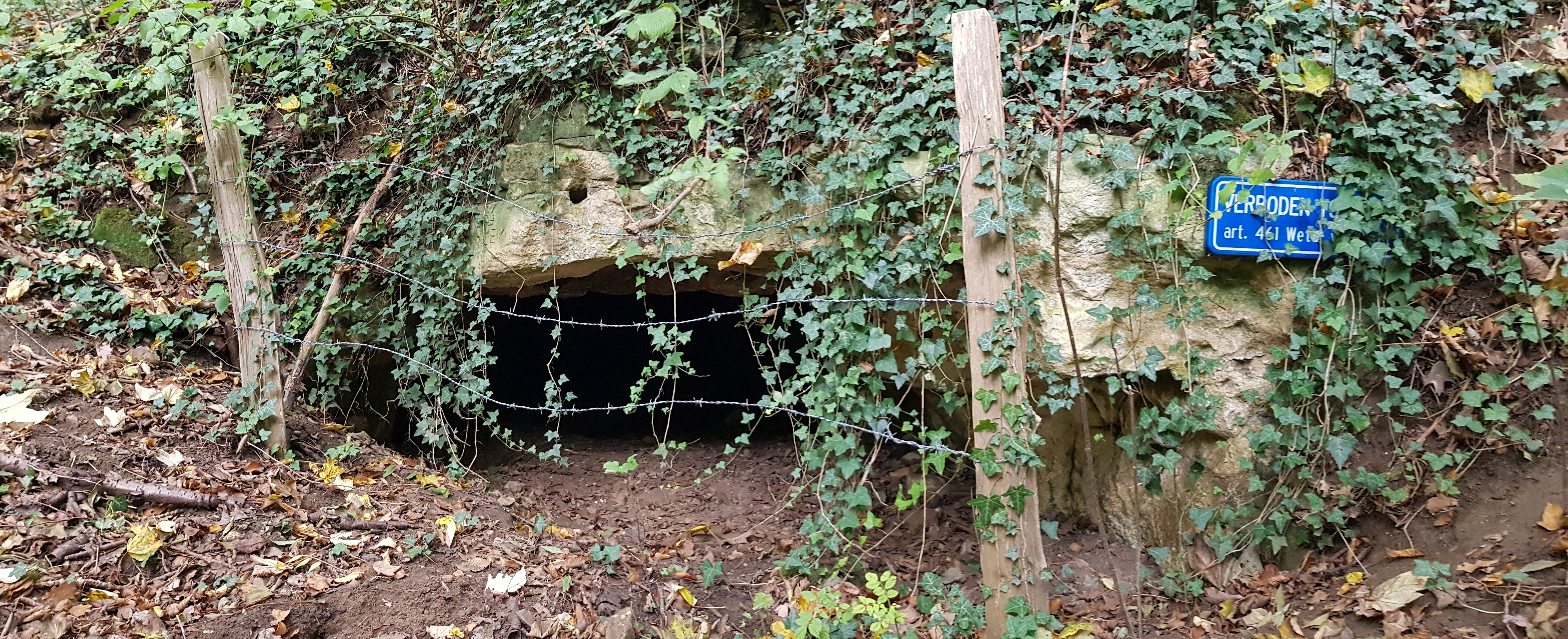 Sint-Jansboschgroeve IV, Oud-Valkenburg, Nederland